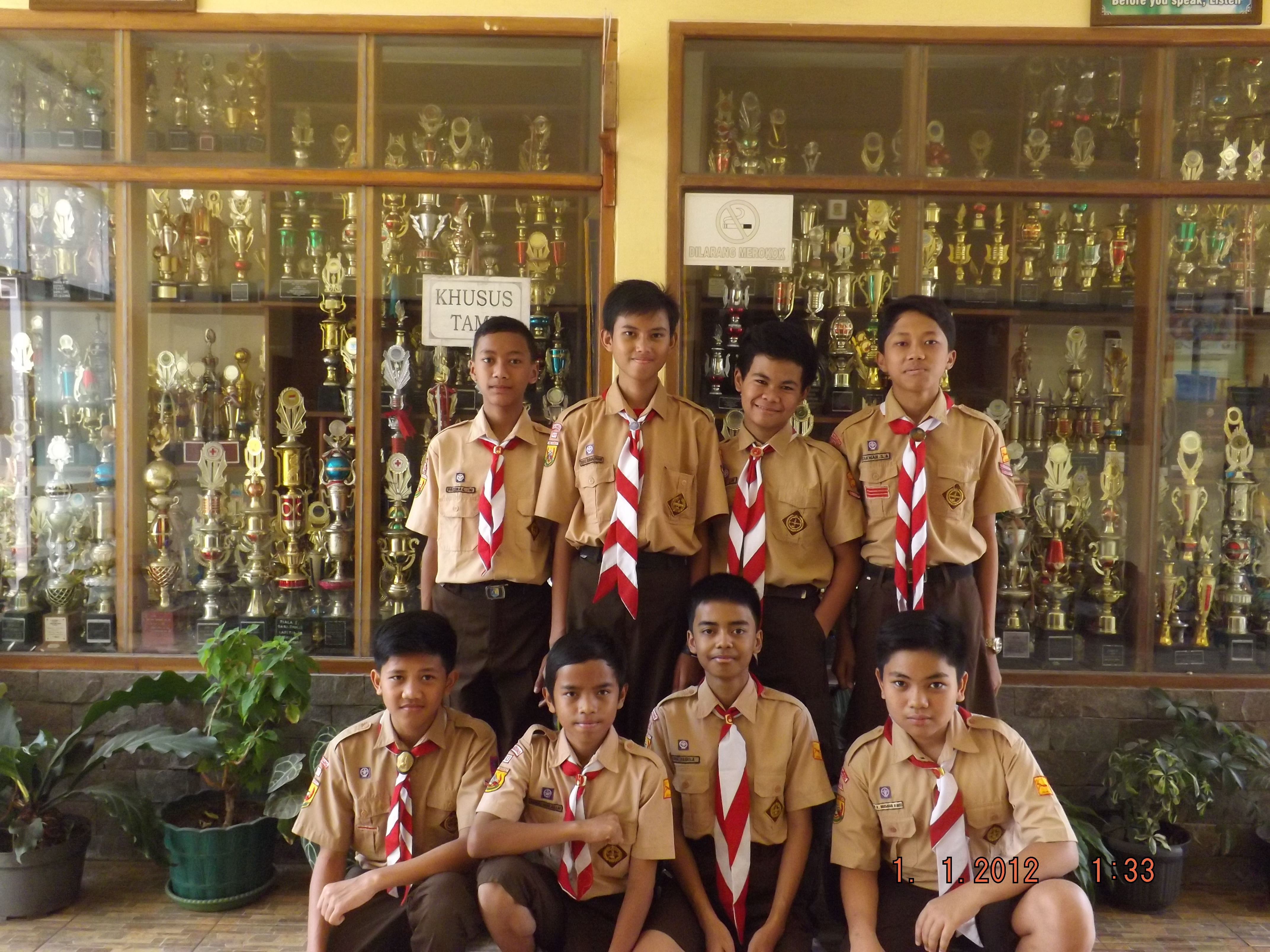 Pramuka SMPN 3 Pada saat menghadapi LT 2 Regol